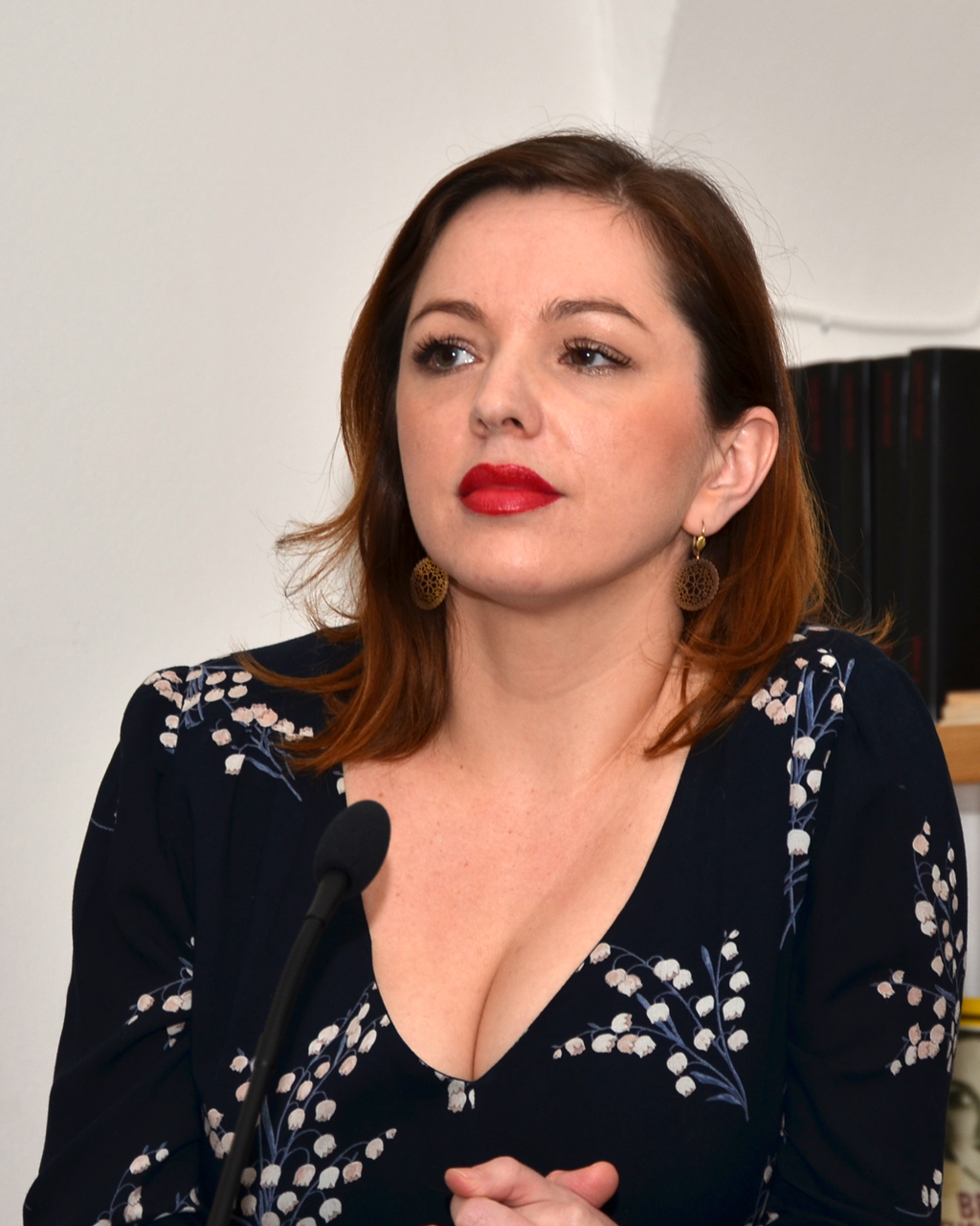 Sylvie Lauder (2016)